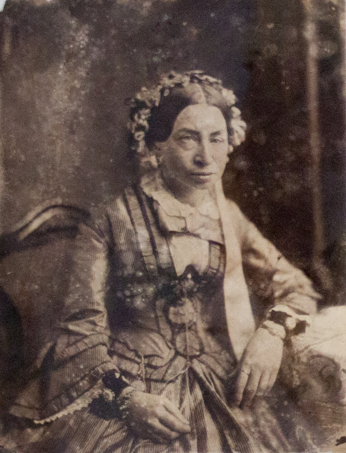 Holländer Leó feleségének fényképe